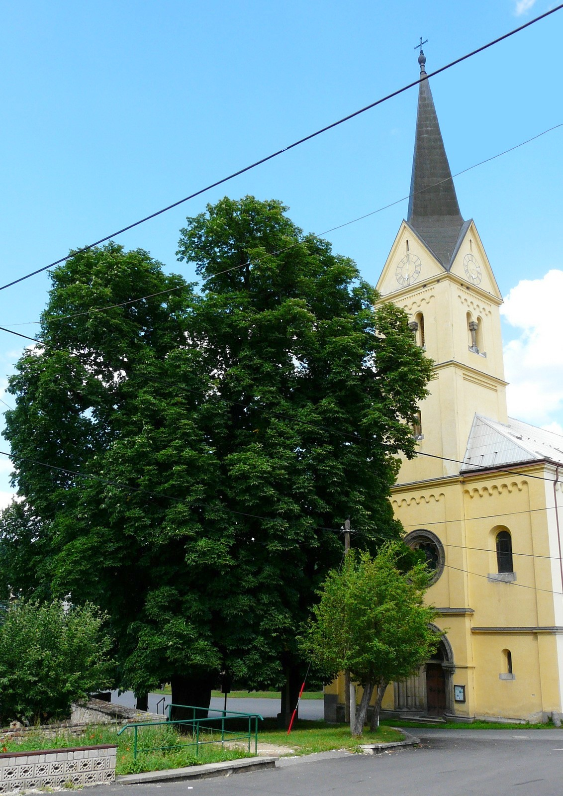 Pohled od západu